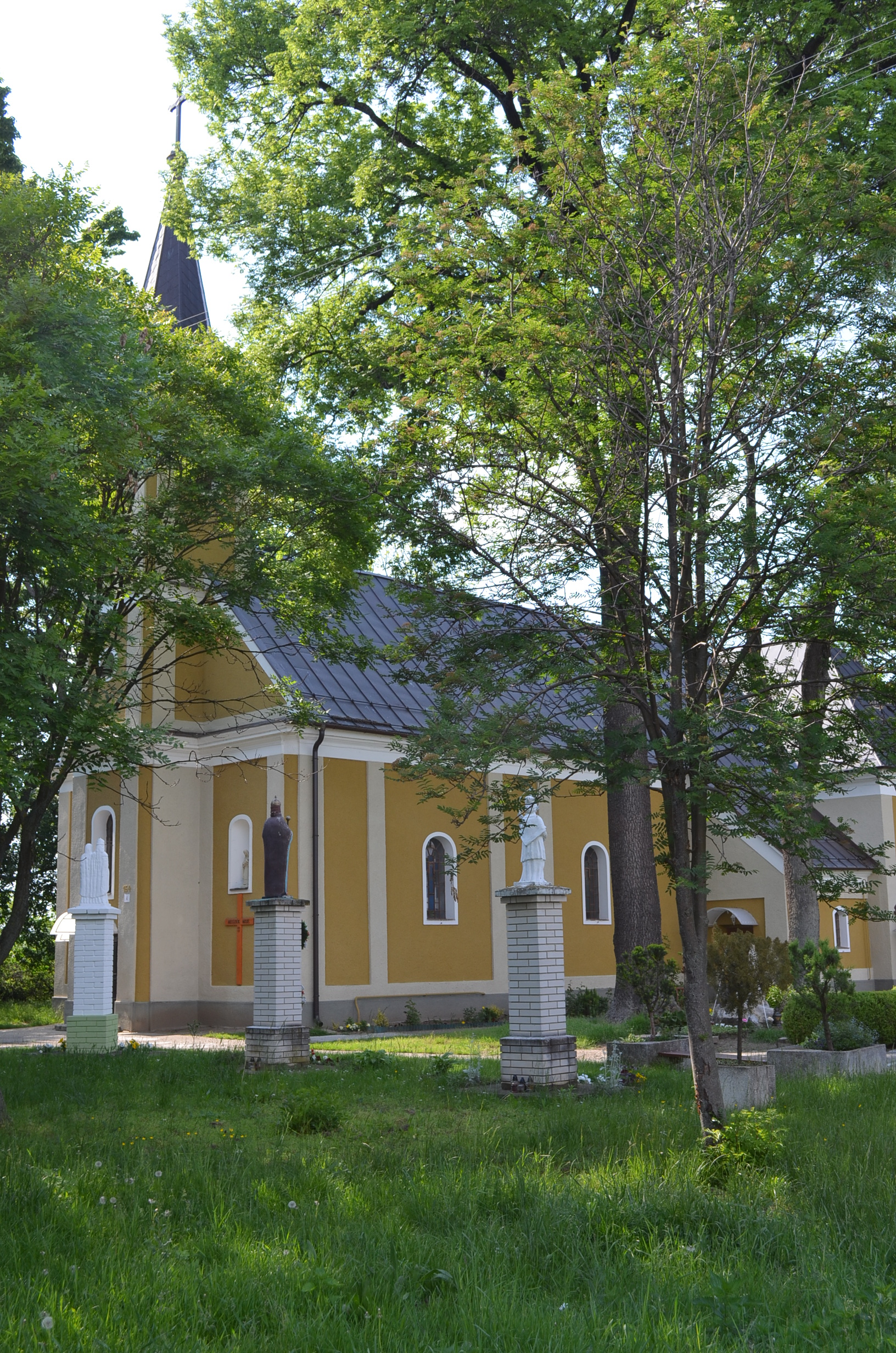 Nyitracsehi